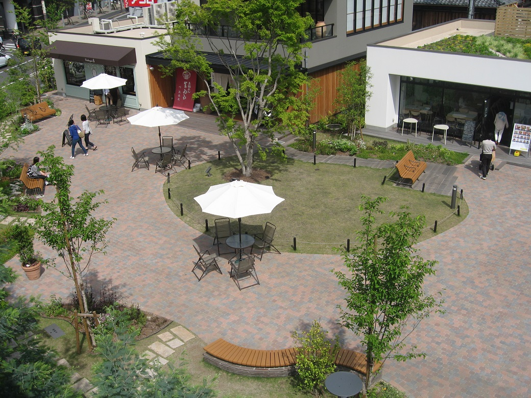 草津駅東口ニワタス